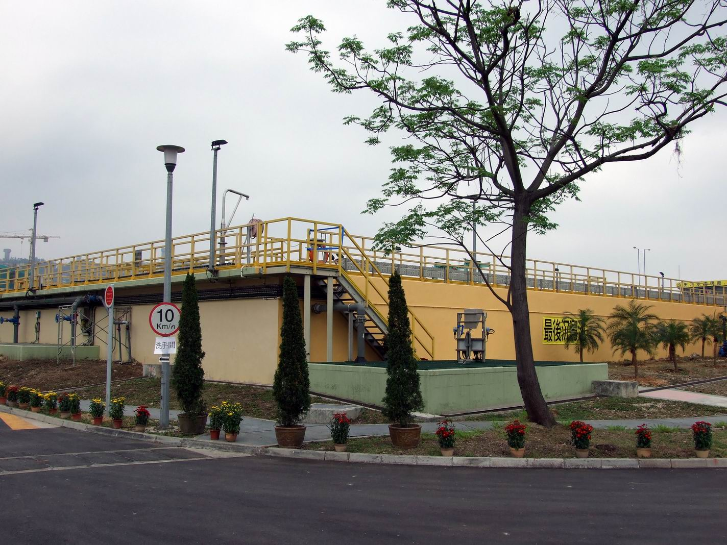 方形最後沉澱池